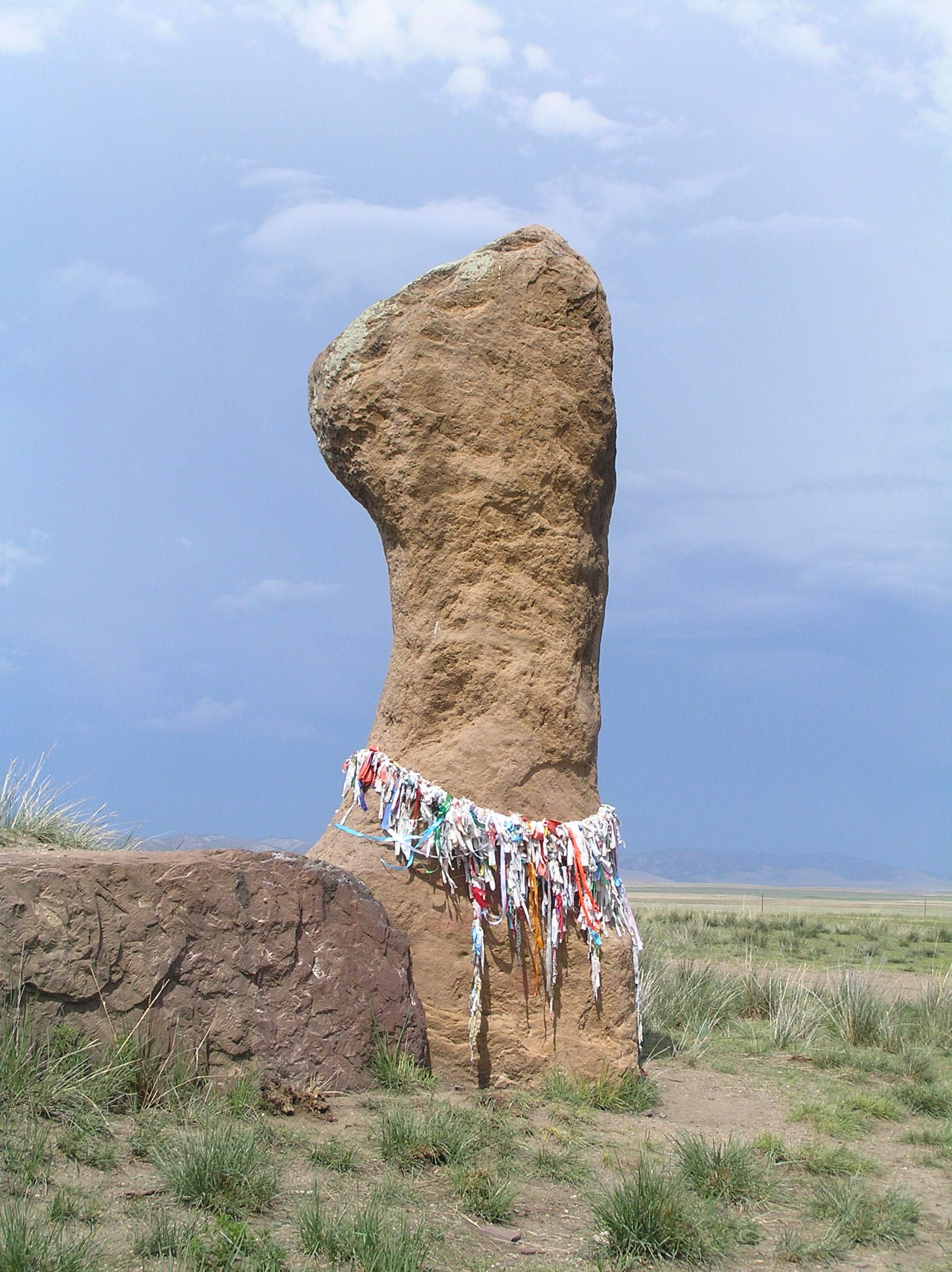 Камень у входа в Салбык